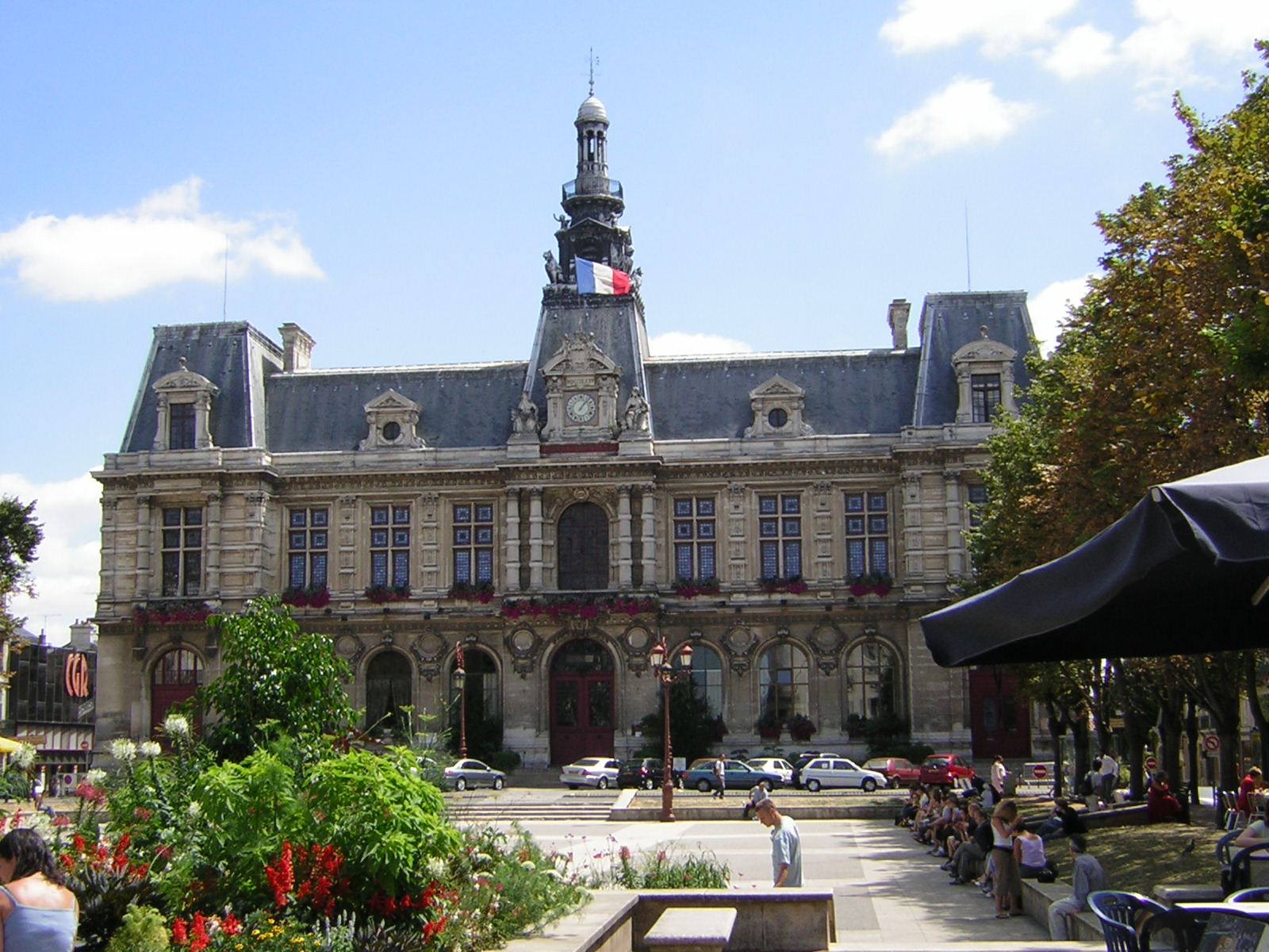 Poitiers: Ayuntamiento.